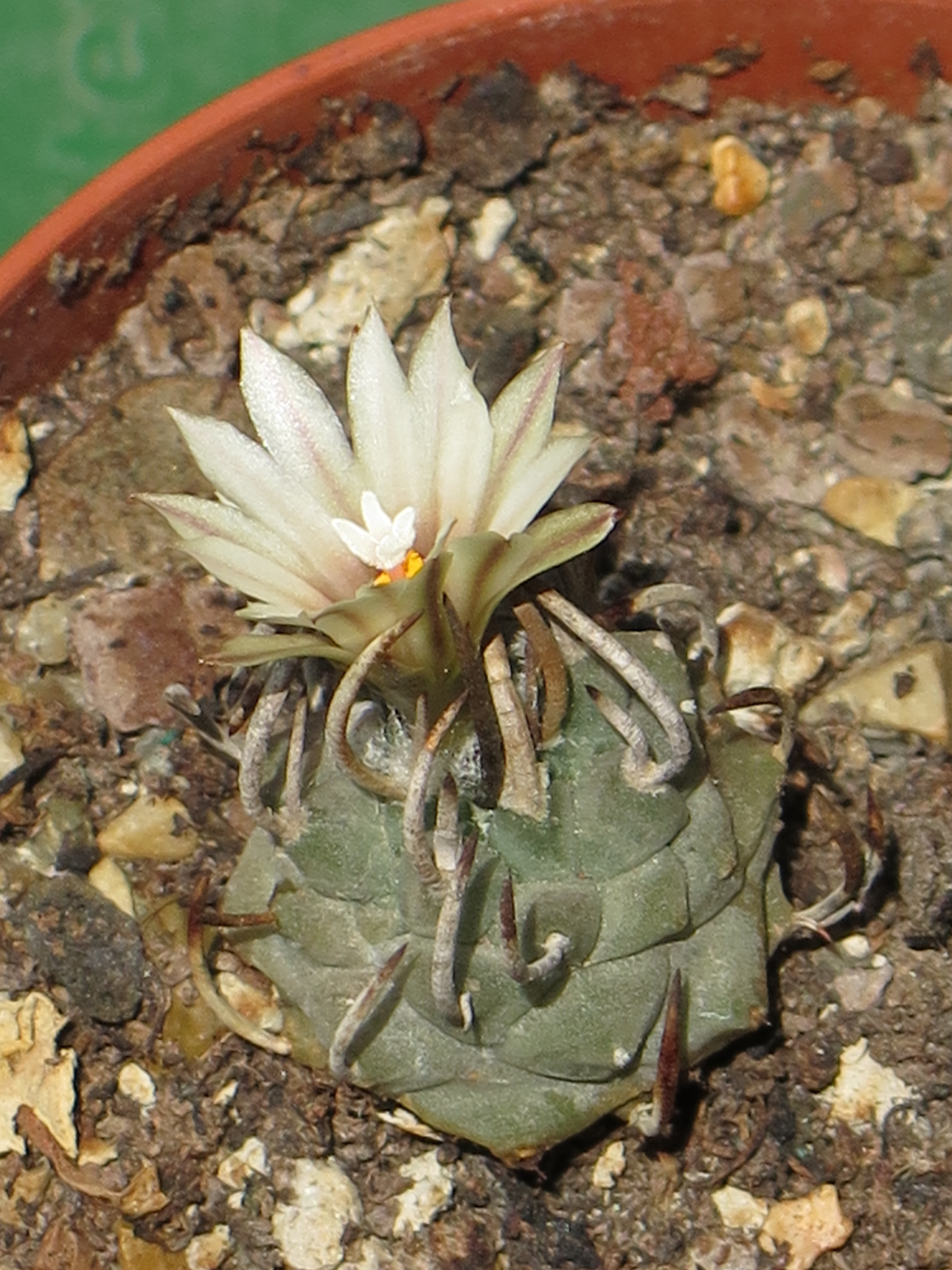 Una pianta di turbinicarpus schmiedickeanus subsp. schwarzii SB269 (Matehuala, San Luis Potosi) in fiore